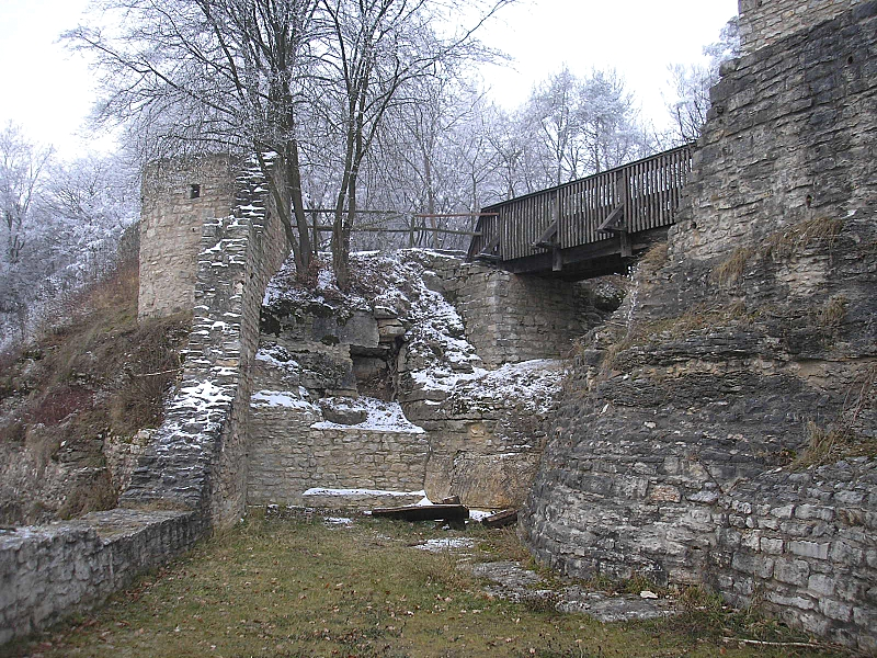 Burg Treuchtlingen (Obere Burg, Landkreis Weißenburg-Gunzenhausen, Mittelfranken). Zwinger der Hauptburg nach Westen. Blick zur Vorburg. Eigene Aufnahme, Dez. 2007 / Treuchtlingen castle (Upper castle, Middle Franconia, Bavaria, Germany). Southern part of the central castle. Looking west to the bailey. Own photo, Dec. 2007